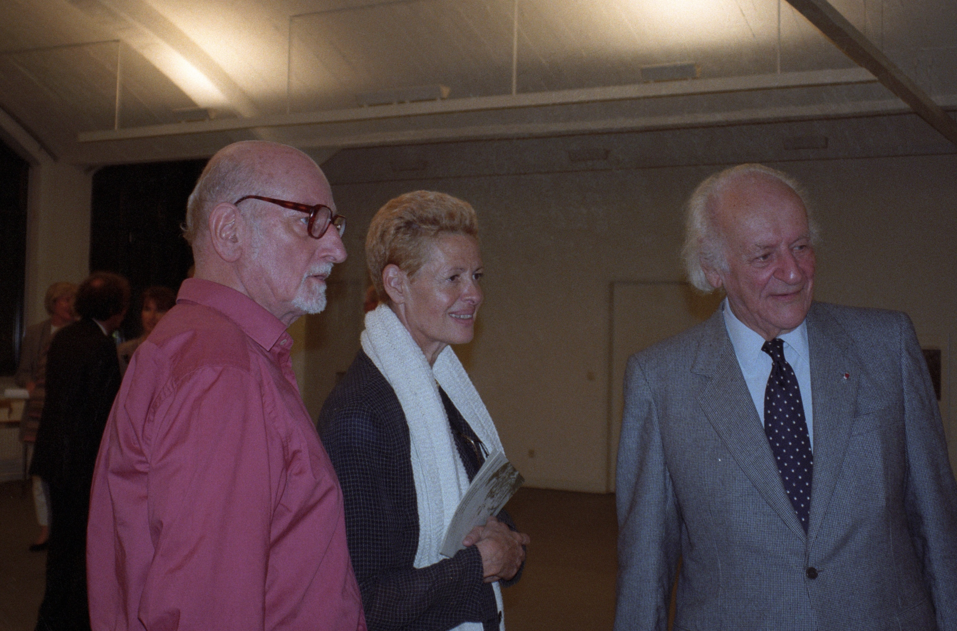 Hamburgs ehemaliger Staatsopernintendant Rolf Liebermann besucht mit dem Fotografen Fritz Peyer dessen Fotoausstellung